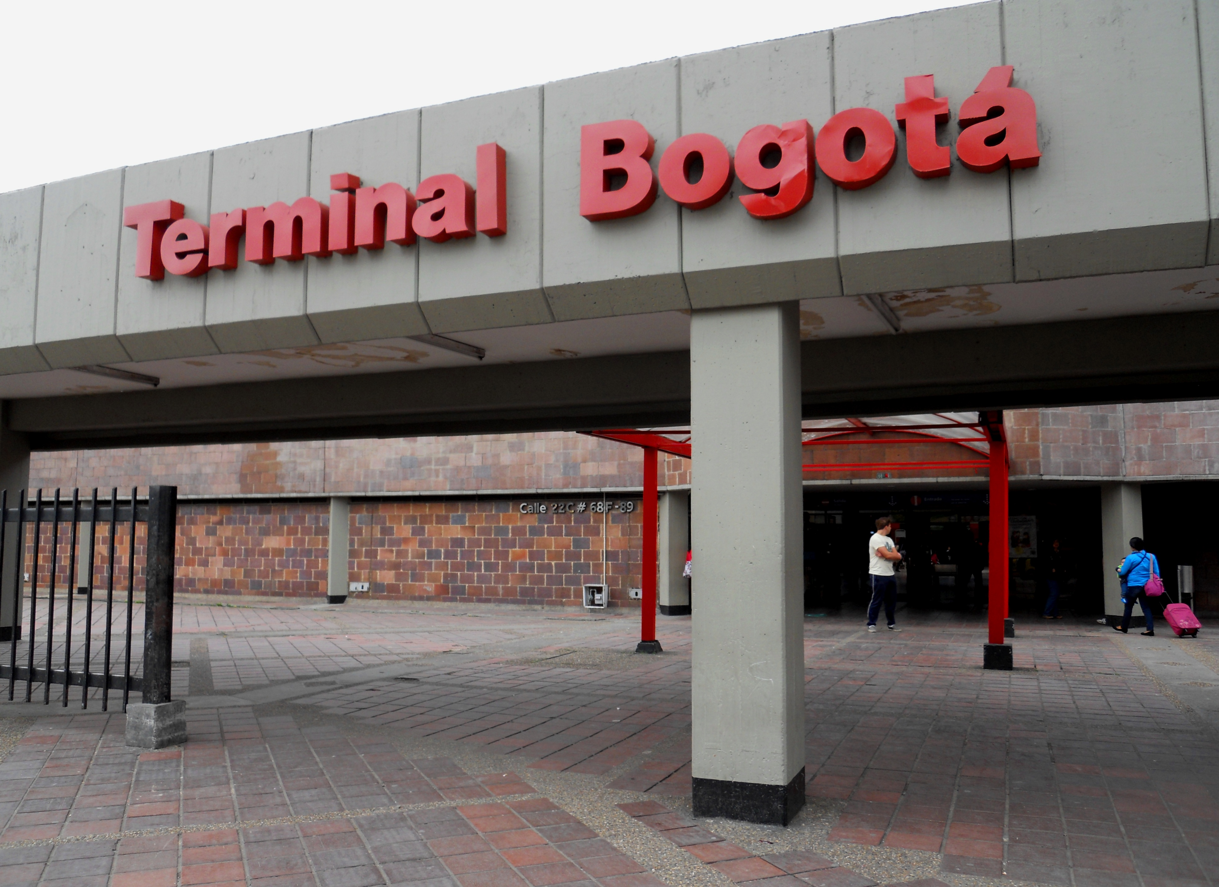 Entrada tres de la Terminal de Bogotá.